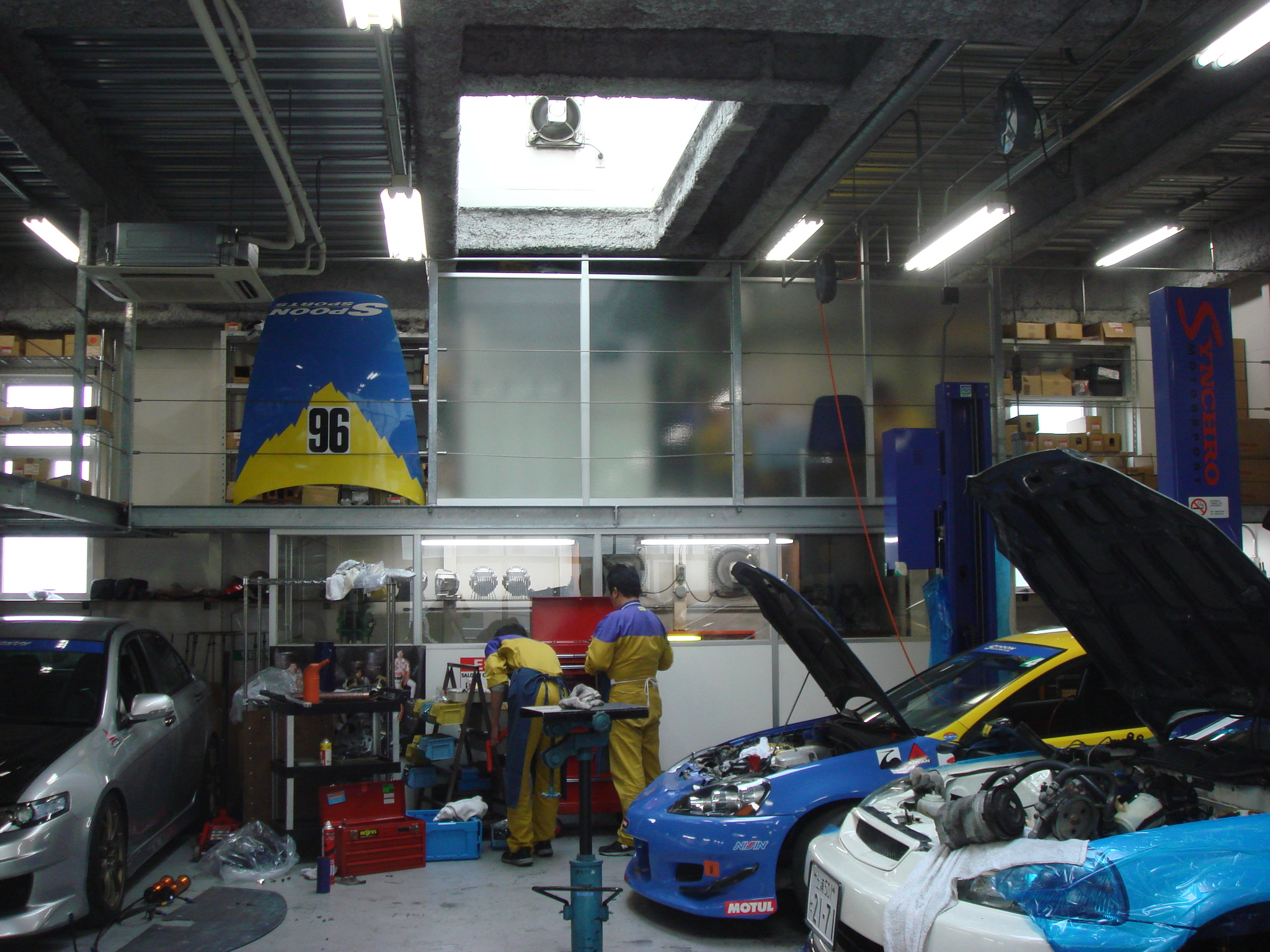 TYPEONE